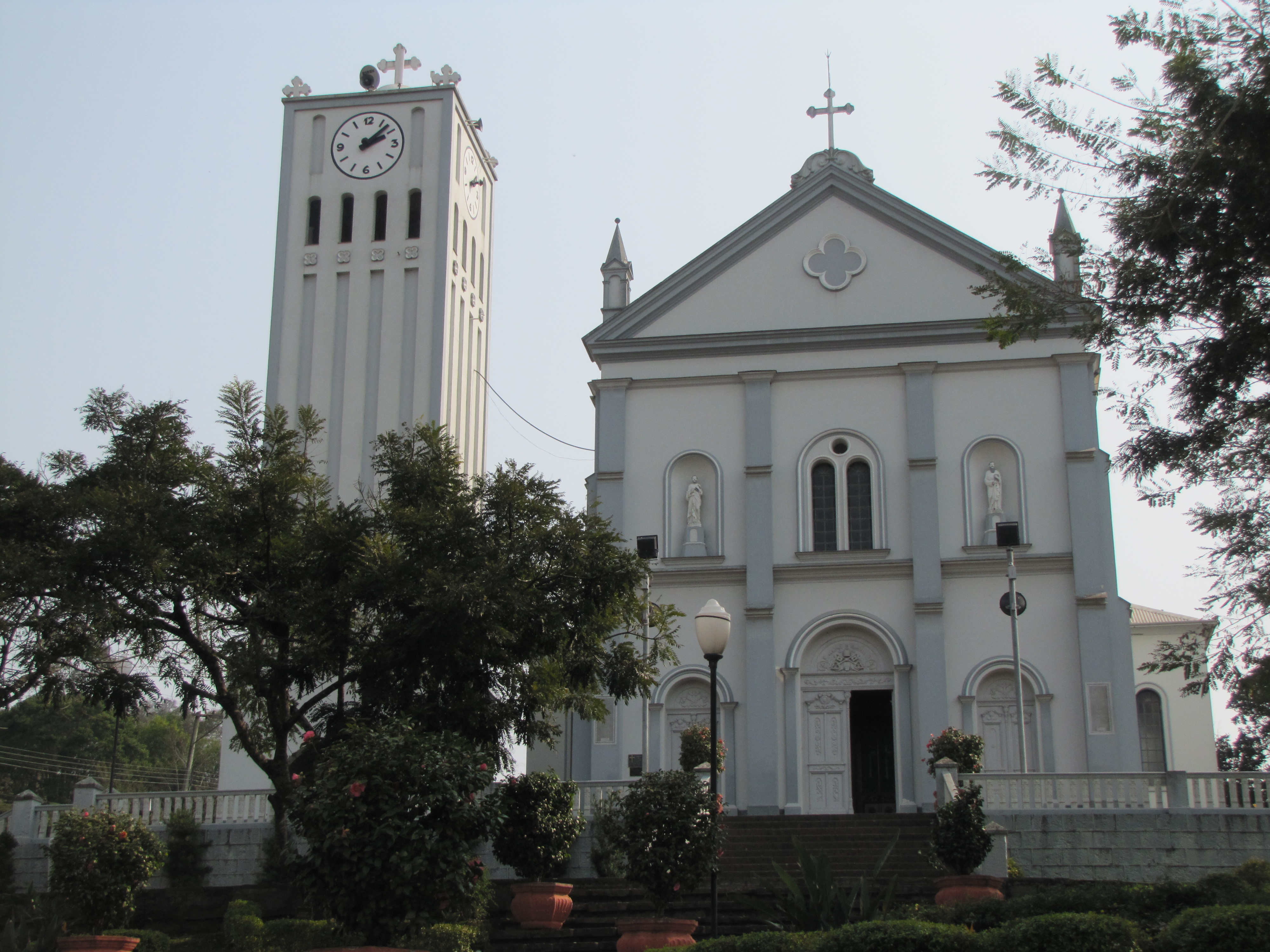 Igreja Matriz de Nova Roma do Sul, RS.